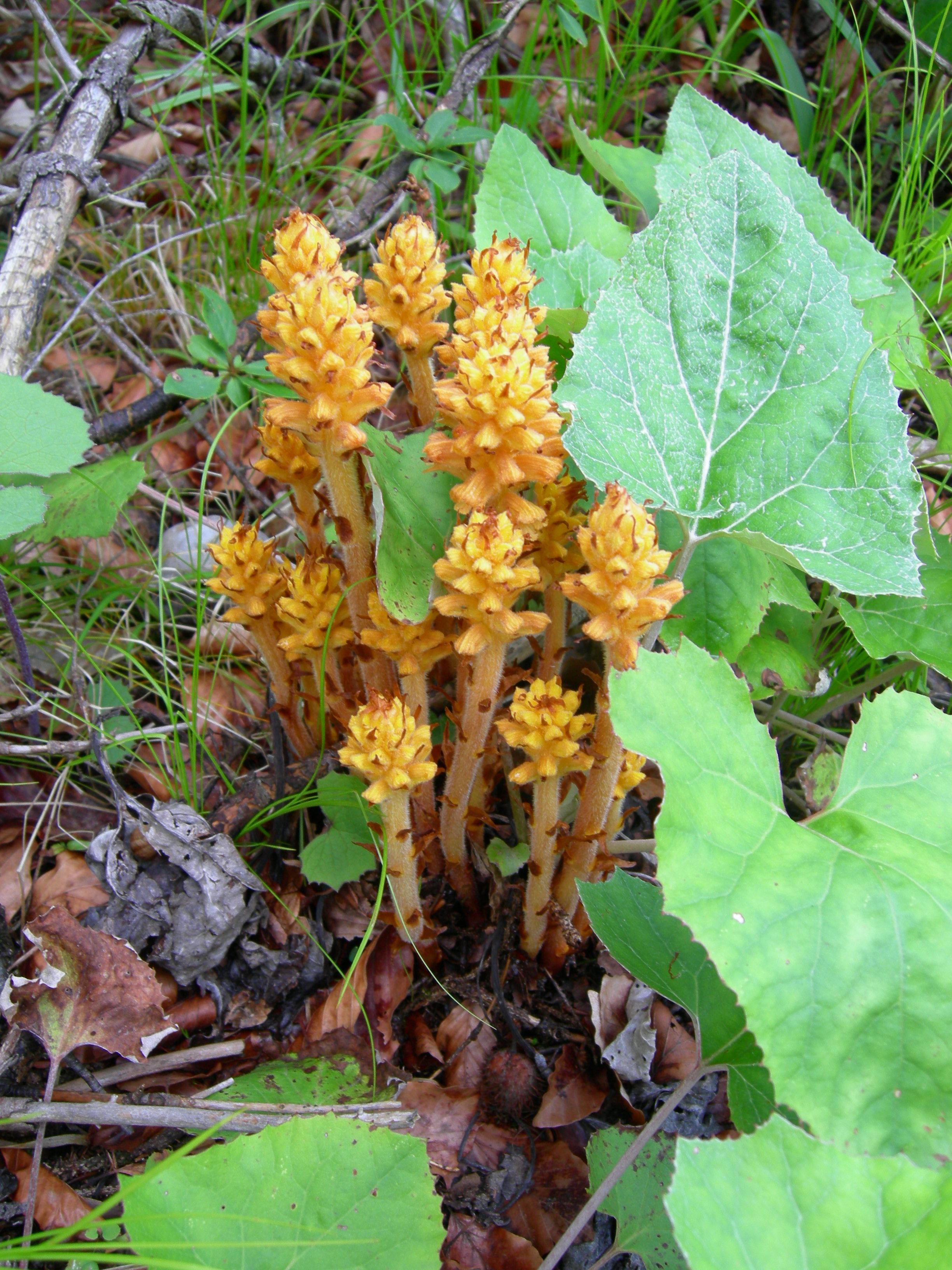 Orobanche flava (found in Robanov kot, Slovenia)